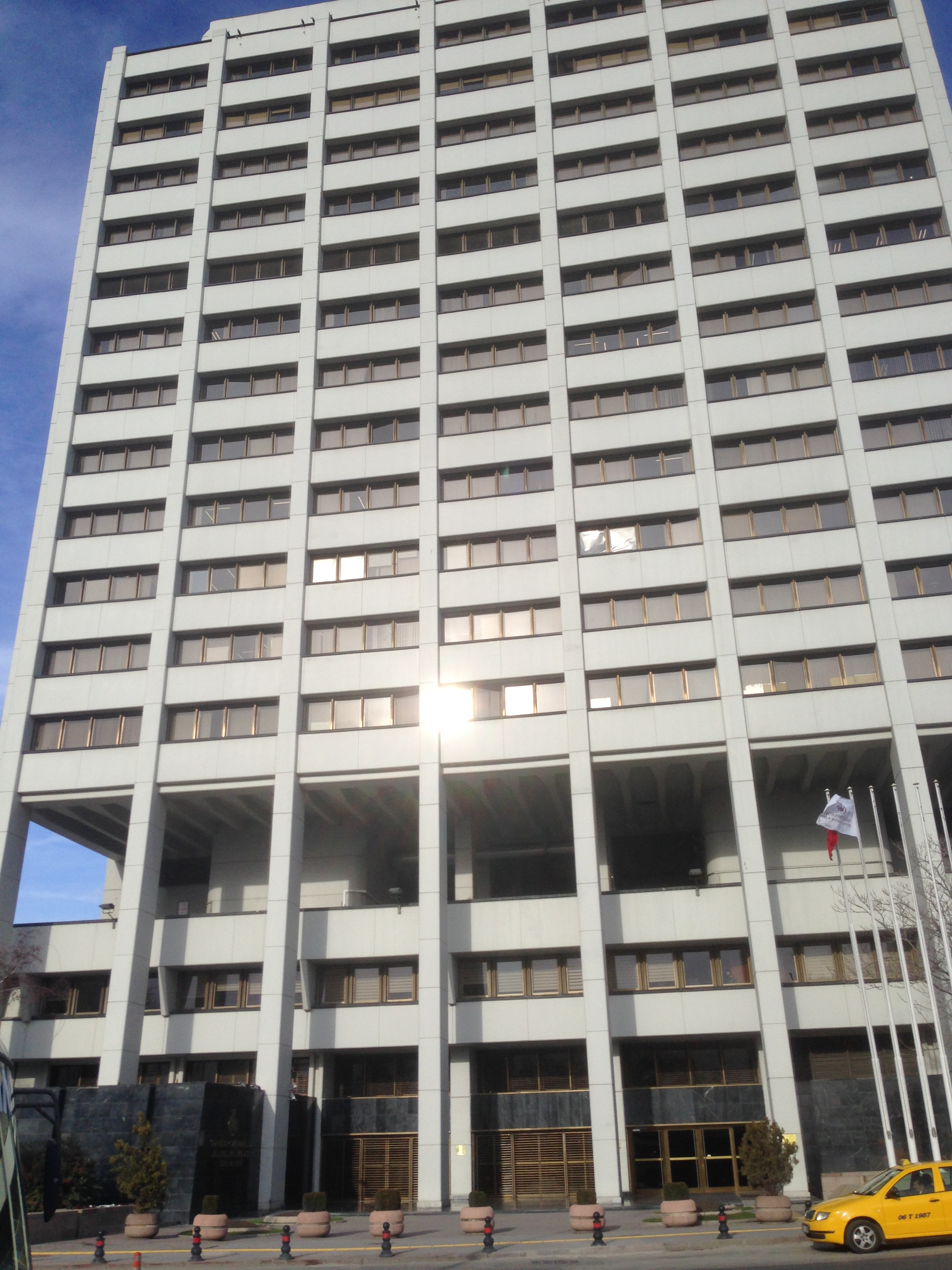 TC Merkez Bankası ön cephe